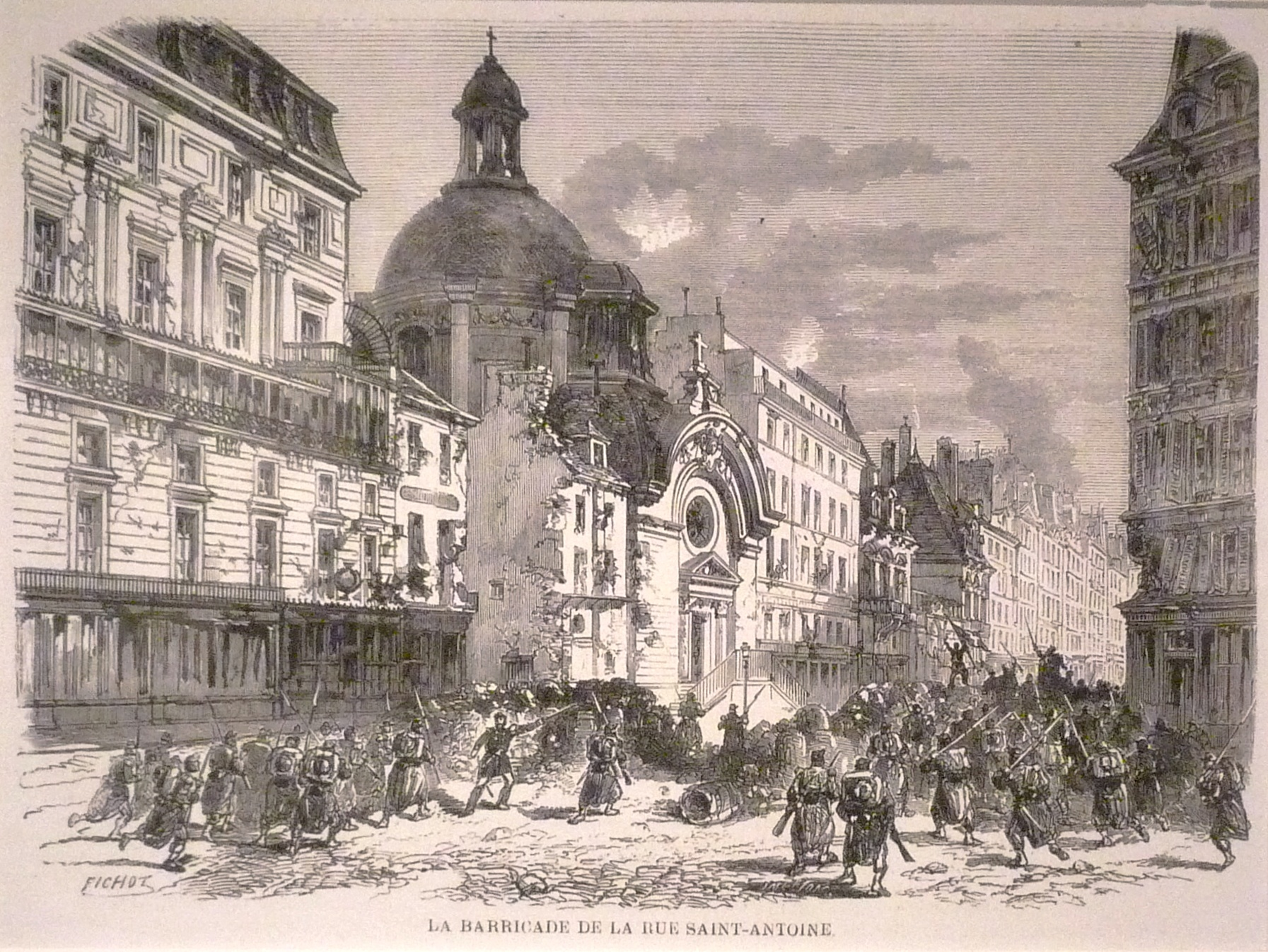 Exposition La Commune de Paris à l'Hôtel de Ville de Paris (18 mars - 28 mai 2011) - 25 mai : Combats sur la barricade de la rue Saint-Antoine, munie de canons, elle résista deux jours durant - Gravure de Charles Fichot pour Lillustration du 10 juin 1871 - Bibliothèque historique de la Ville de Paris.